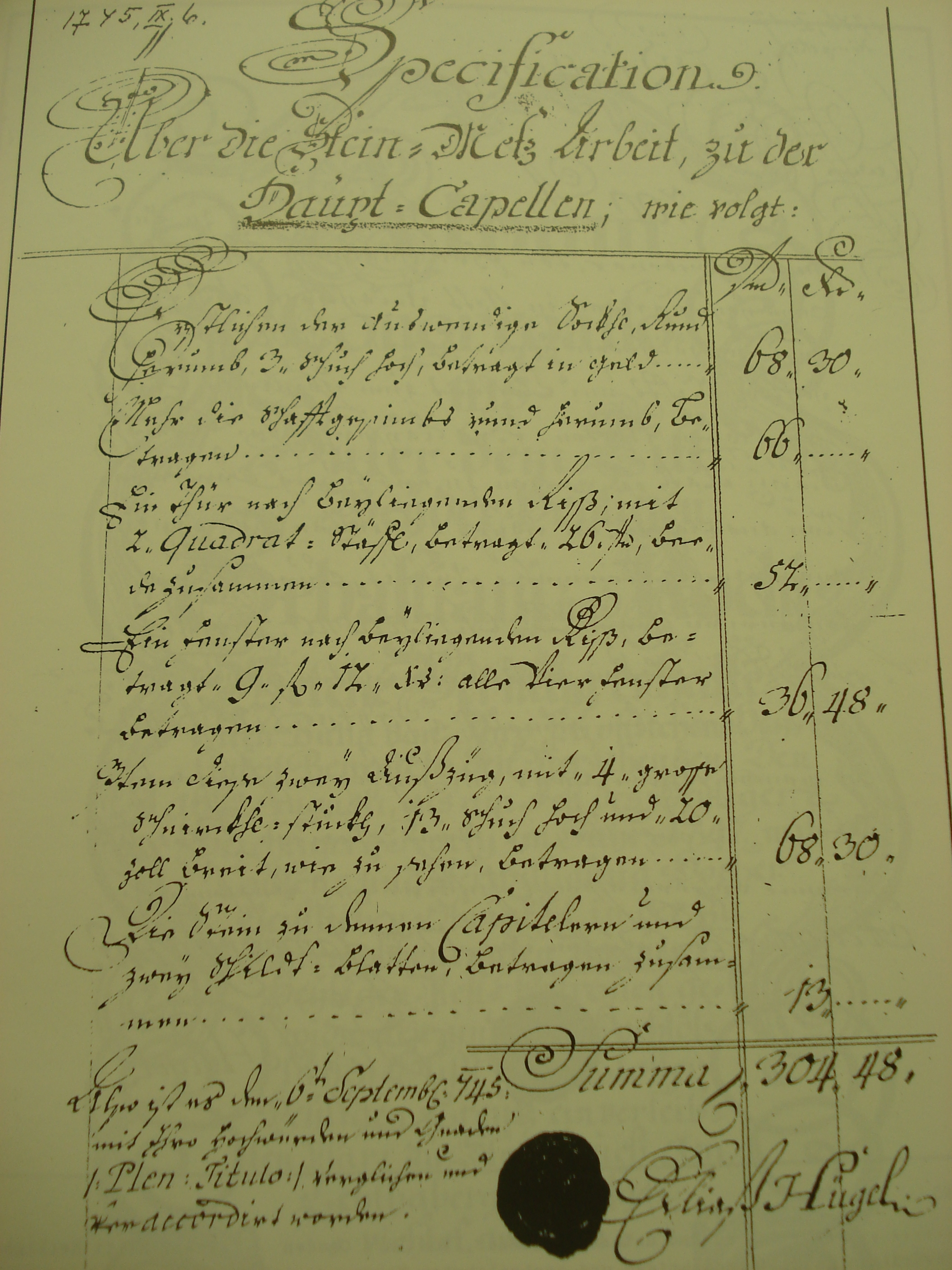 Steinmetzrechnung des Elias Hügel, Kapelle im Schloss Königshof